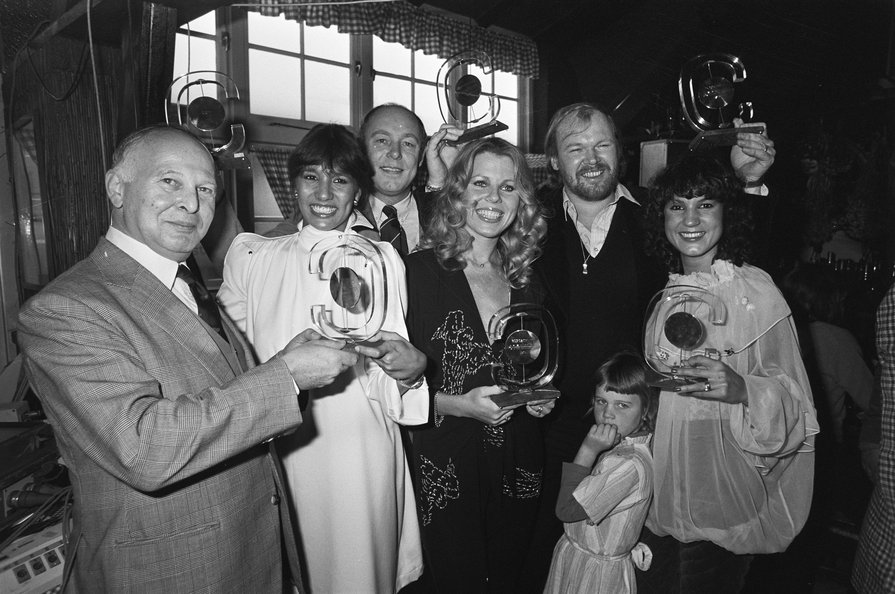 Collectie / Archief : Fotocollectie Anefo Reportage / Serie : [ onbekend ] Beschrijving : Exportprijs van Conamus uitgereikt aan Luv door Theo Olof in Loosdrecht; Olof met Patty, Marga en Jose, Piet Souer en ter Linden Datum : 31 december 1979 Trefwoorden : componisten, managers, popgroepen, prijzen Persoonsnaam : Conamus, Jose, Olof, Theo, Patty, Souer, Piet Fotograaf : Croes, Rob C. / Anefo Auteursrechthebbende : Nationaal Archief Materiaalsoort : Negatief (zwart/wit) Nummer archiefinventaris : bekijk toegang 2.24.01.05 Bestanddeelnummer : 930-6025 Reacties Geplaatst door Maaike op 08 november 2013 - 22:55. Persoonsnamen: José Andreoli, Patty Brard, Marga Scheide, Pim ter Linde Locatie: 'In 't Kompas' Plaats: Loosdrecht, Noord-Holland